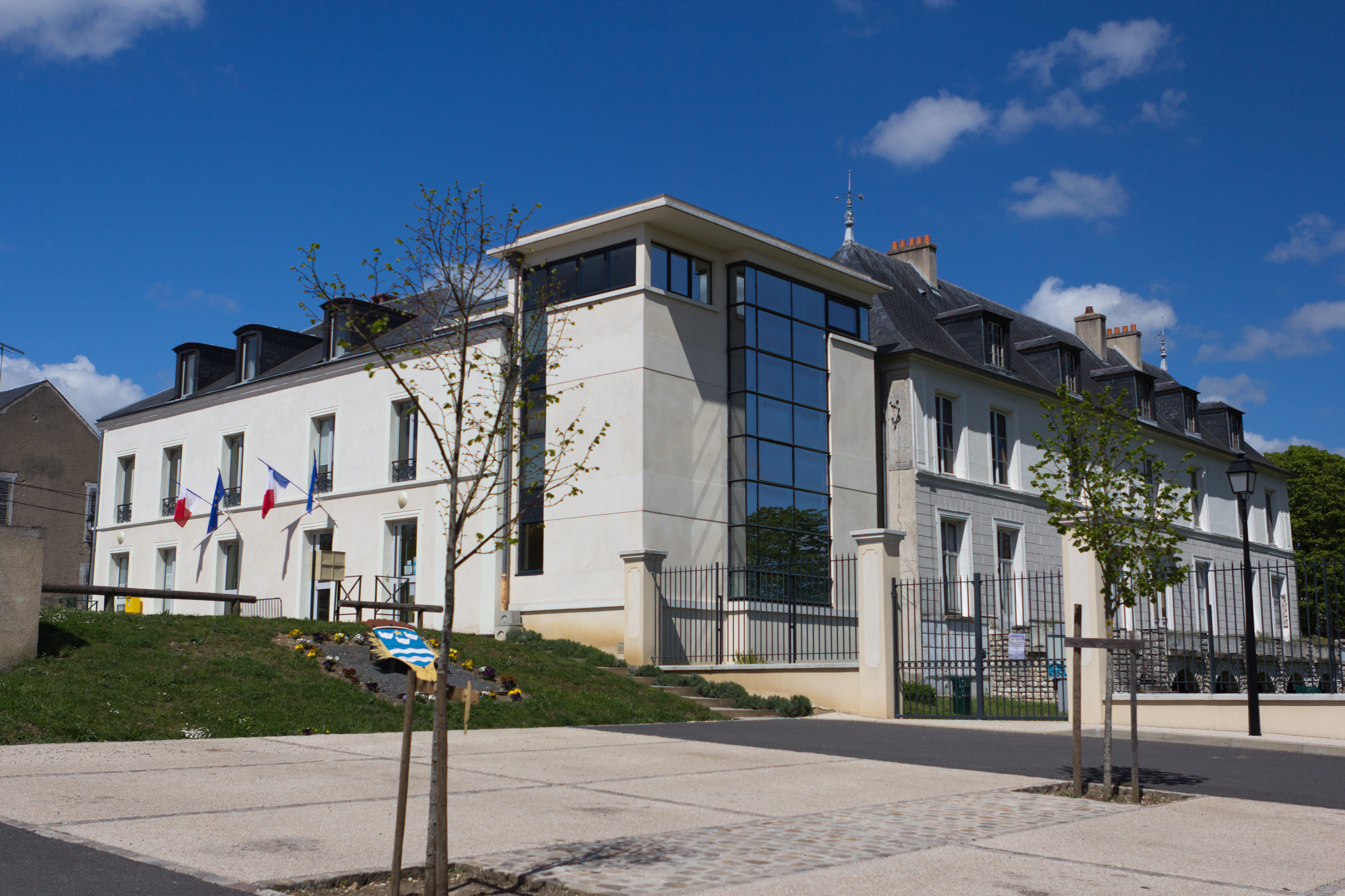 Château de Cerny, Cerny, département de l'Essonne, France.